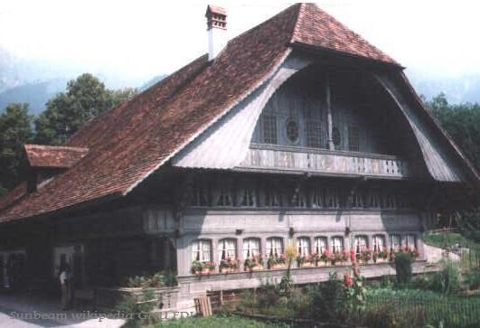 Openluchtmuseum de Ballenberg vlakbij Brienz in Zwitserland. eigen foto